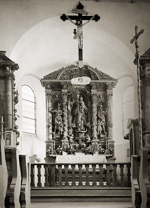 Hochaltar der ehemaligen Kapelle St. Sebastian und Rochus in Nendeln von Ignaz Joseph Bin